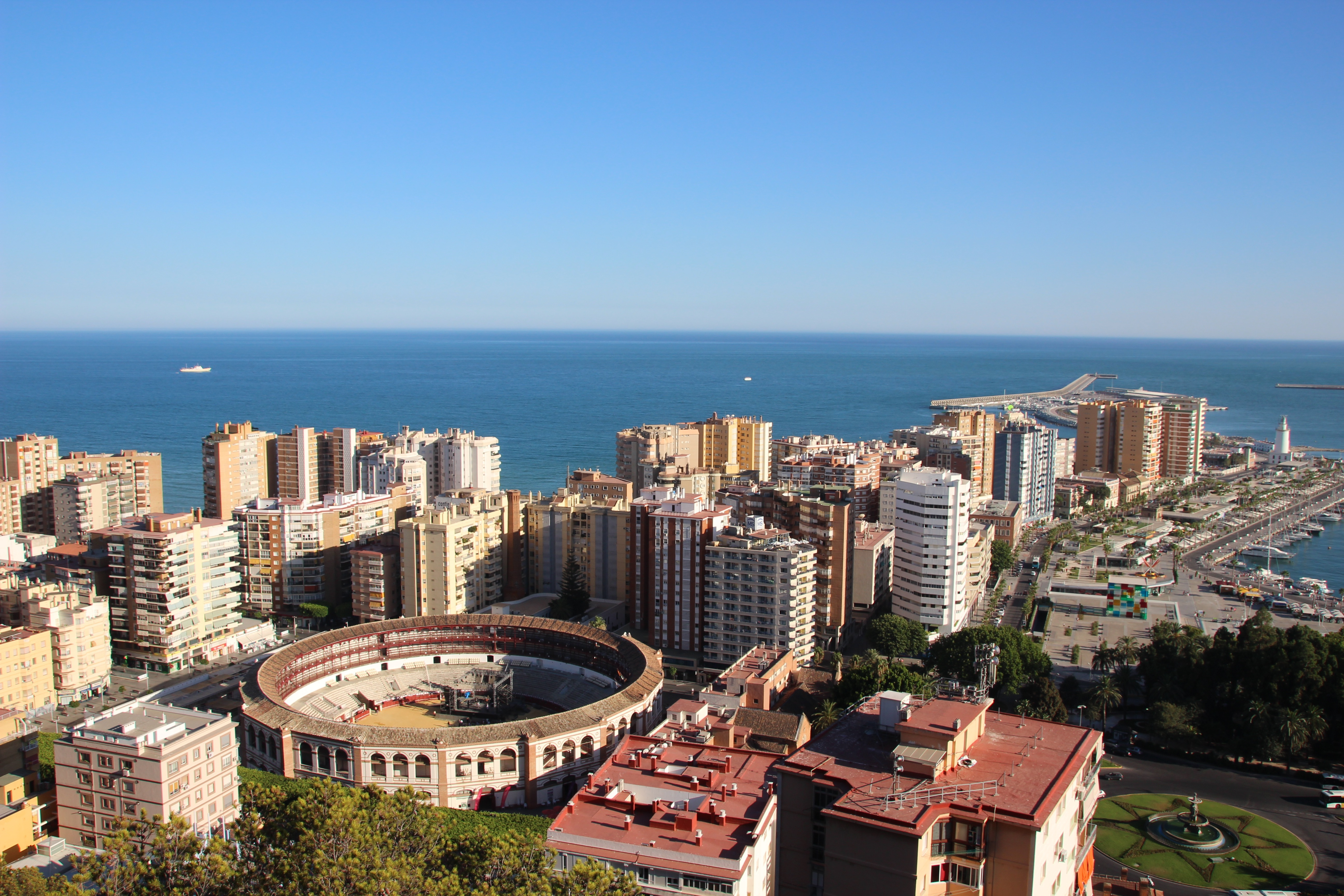 Stierkampfarena Málaga